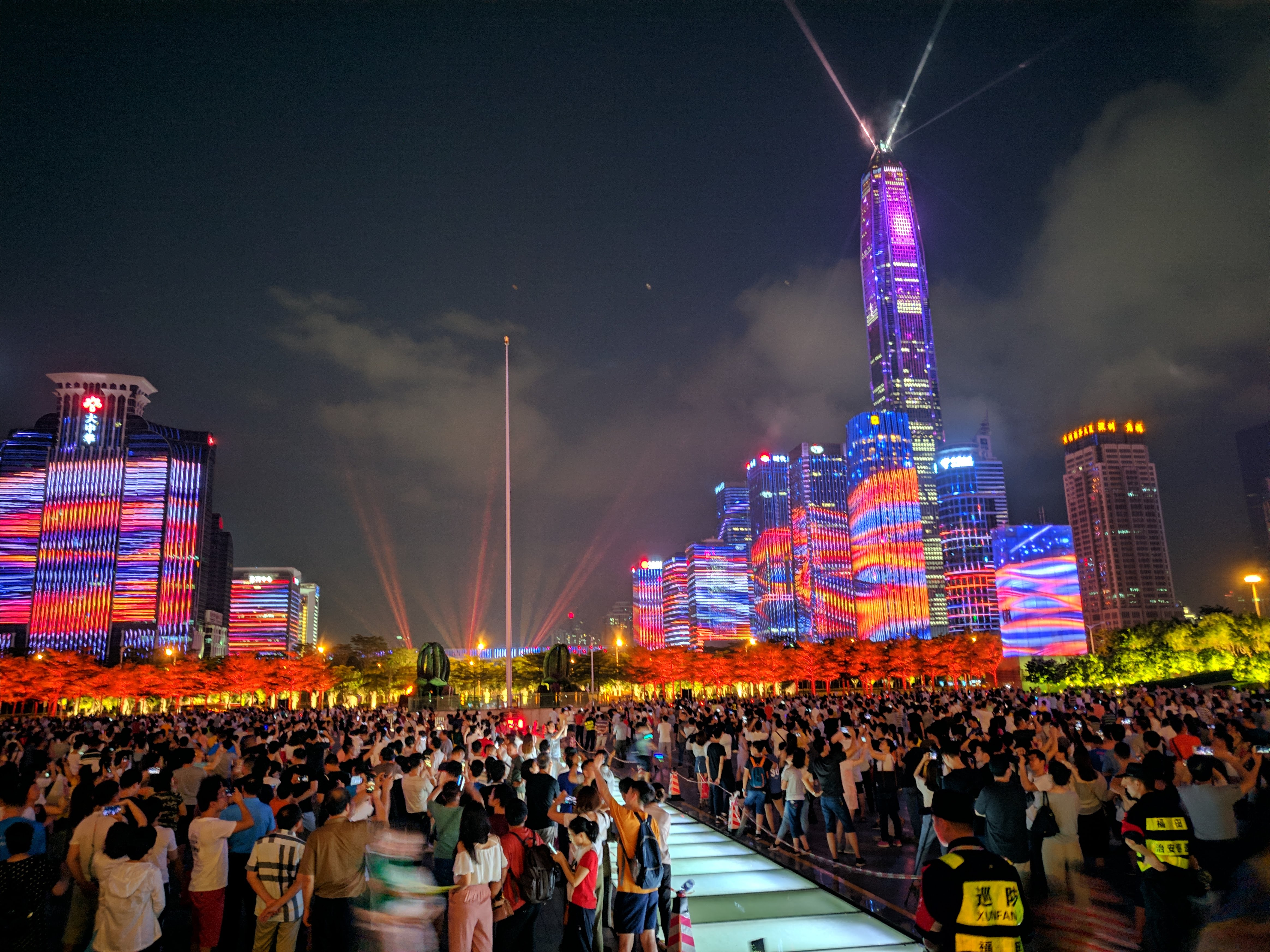 深圳灯光秀